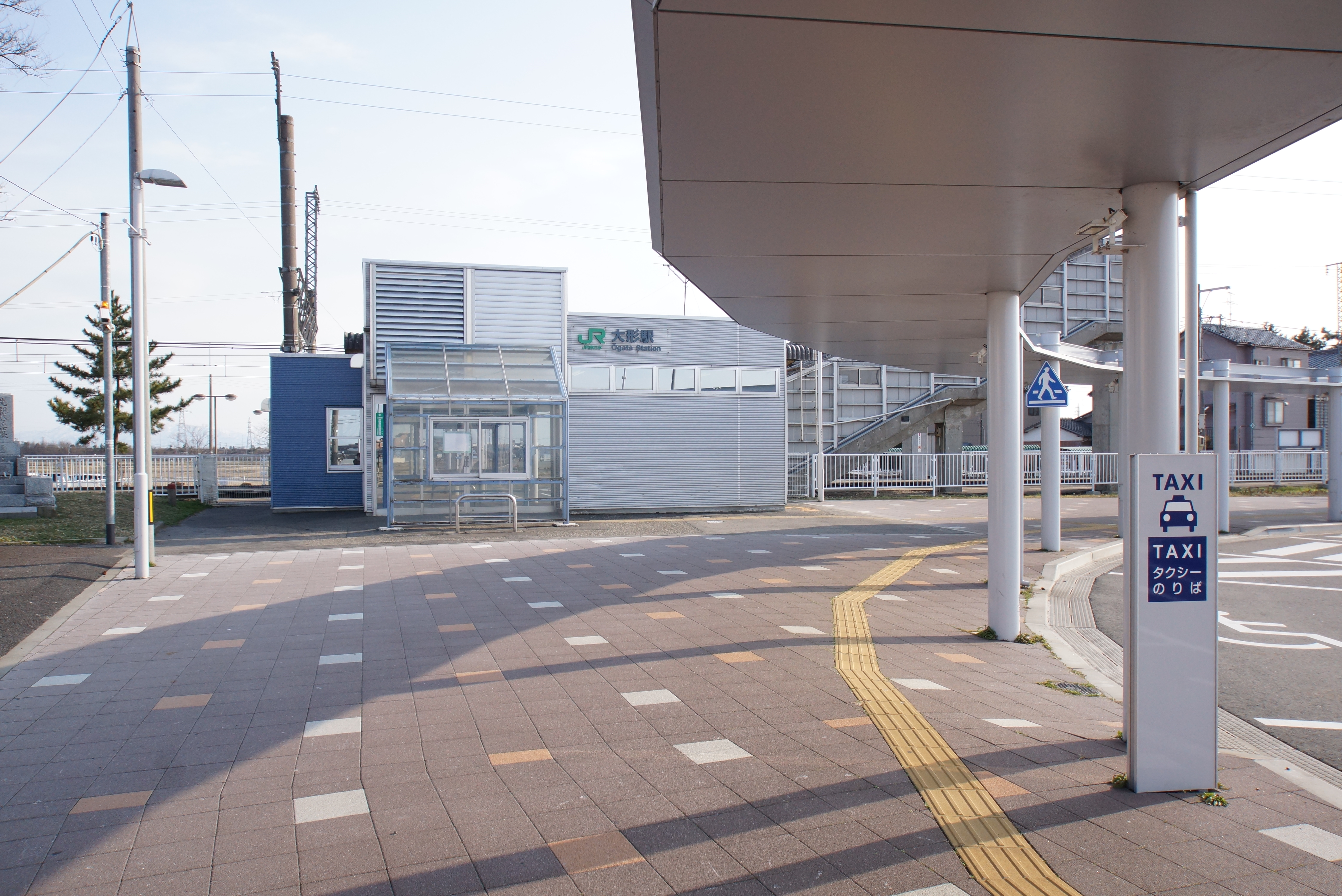 駅舎（2017年3月）